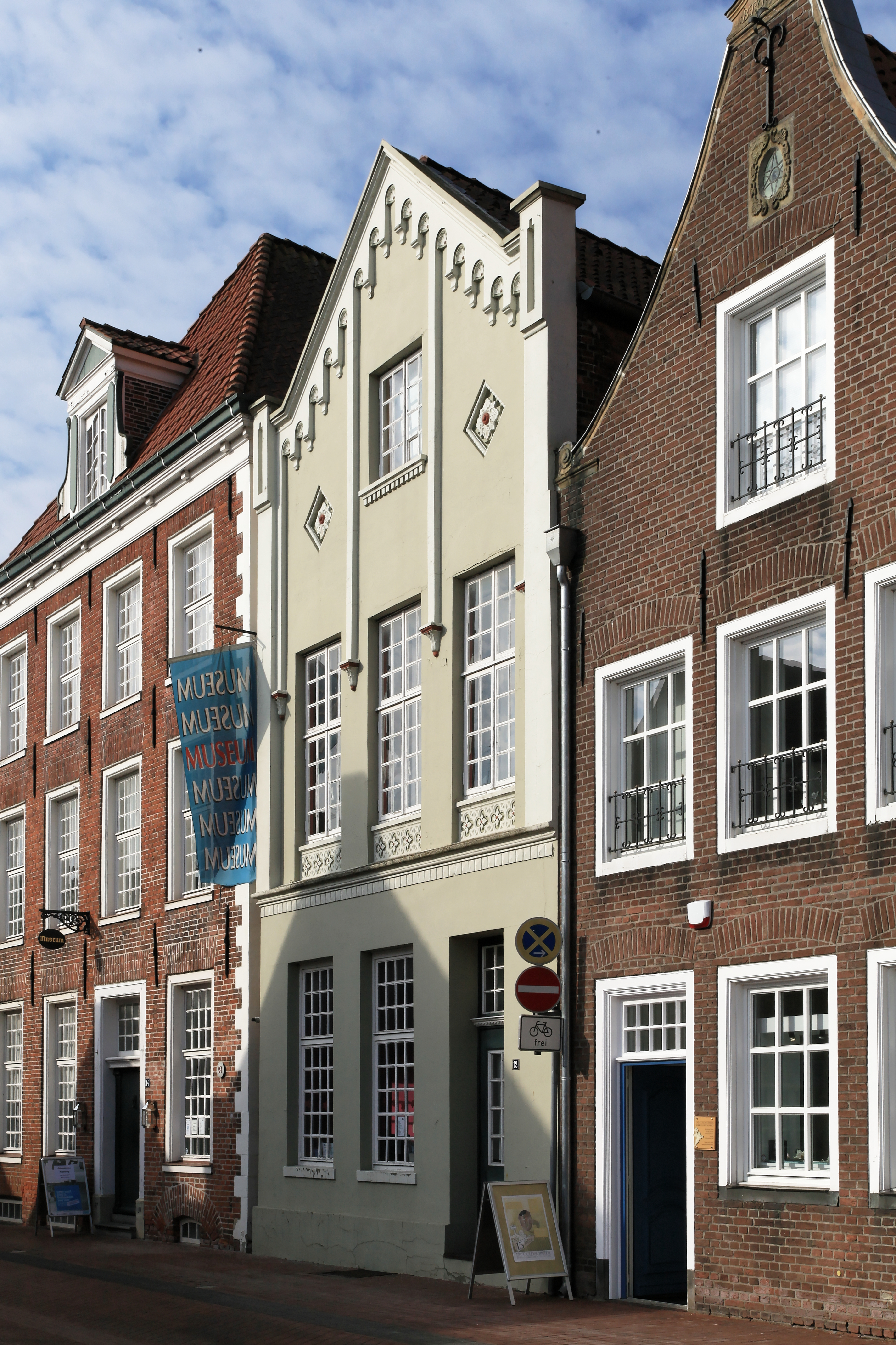 Neue Straße 10, 12 und 14 in Leer (Ostfriesland)